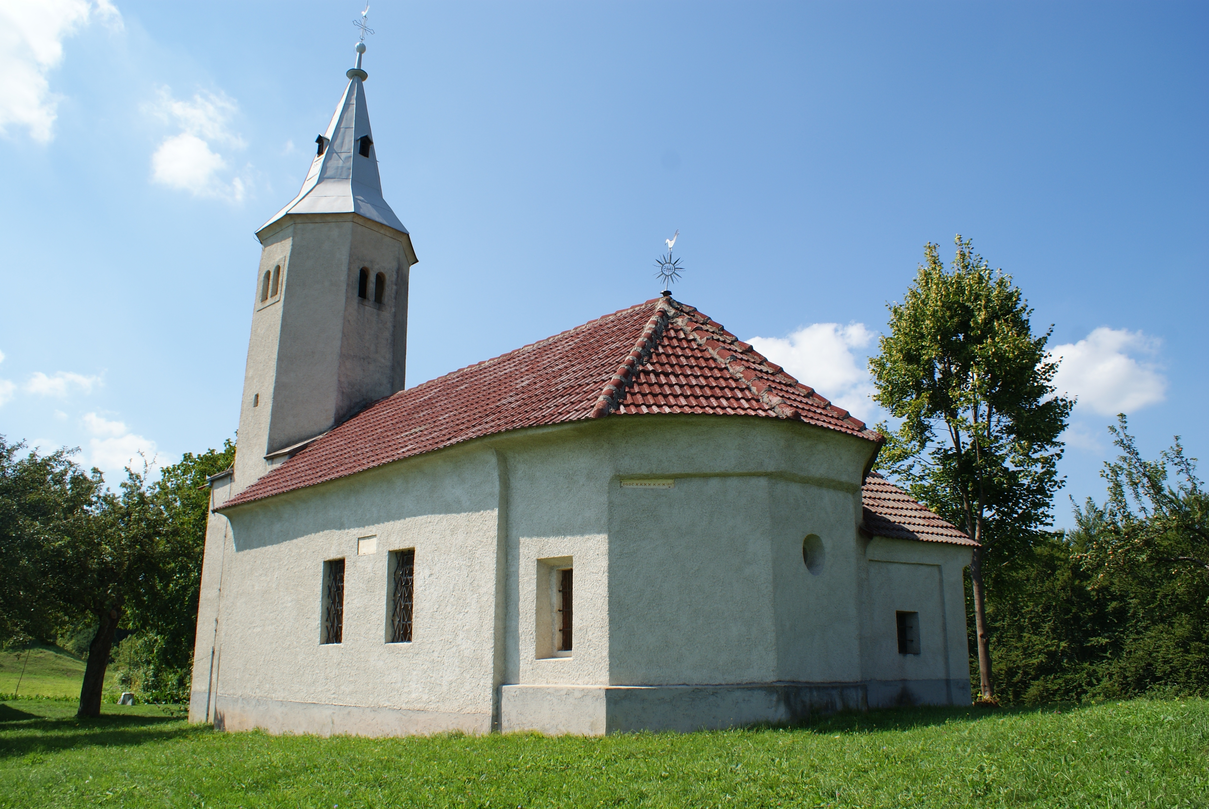 Cerkev sv. Martina v Lamperčah